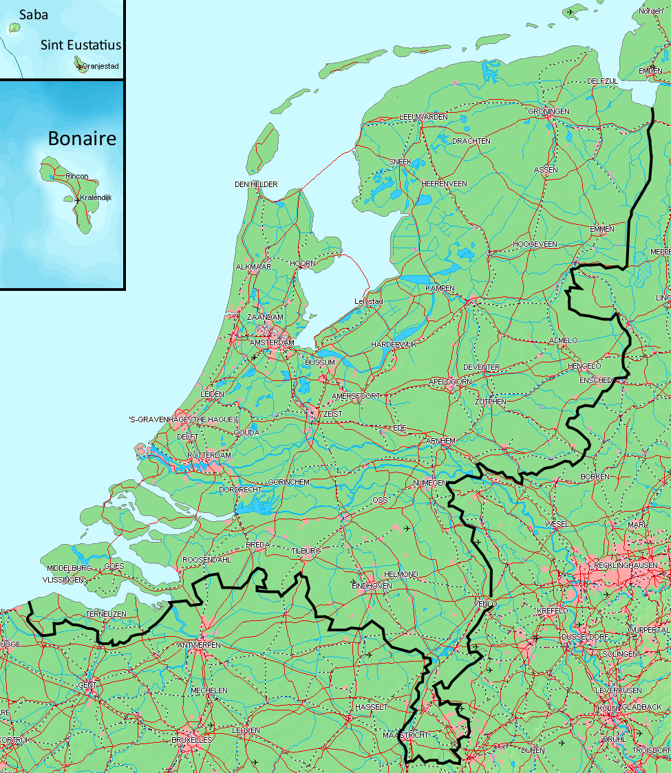 Kaart van Nederland na 10-10-10 Gebaseerd op kaart van (vrije software gebaseerd op vrije database)